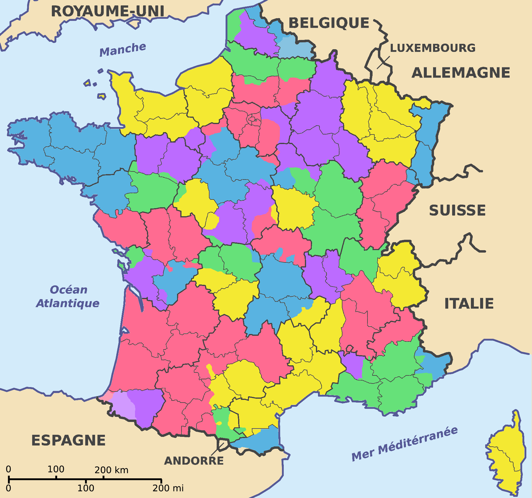 Carte représentant les départements et provinces français d'après la Carte de la France en 1791 dans The Historical Atlas by William R. Shepherd (1926). J'ai indiqué aussi le Hainaut et le Pays basque en tons clairs ; j'en ferais de même pour la Guyenne si les limites de cette dernière étaient moins floues.